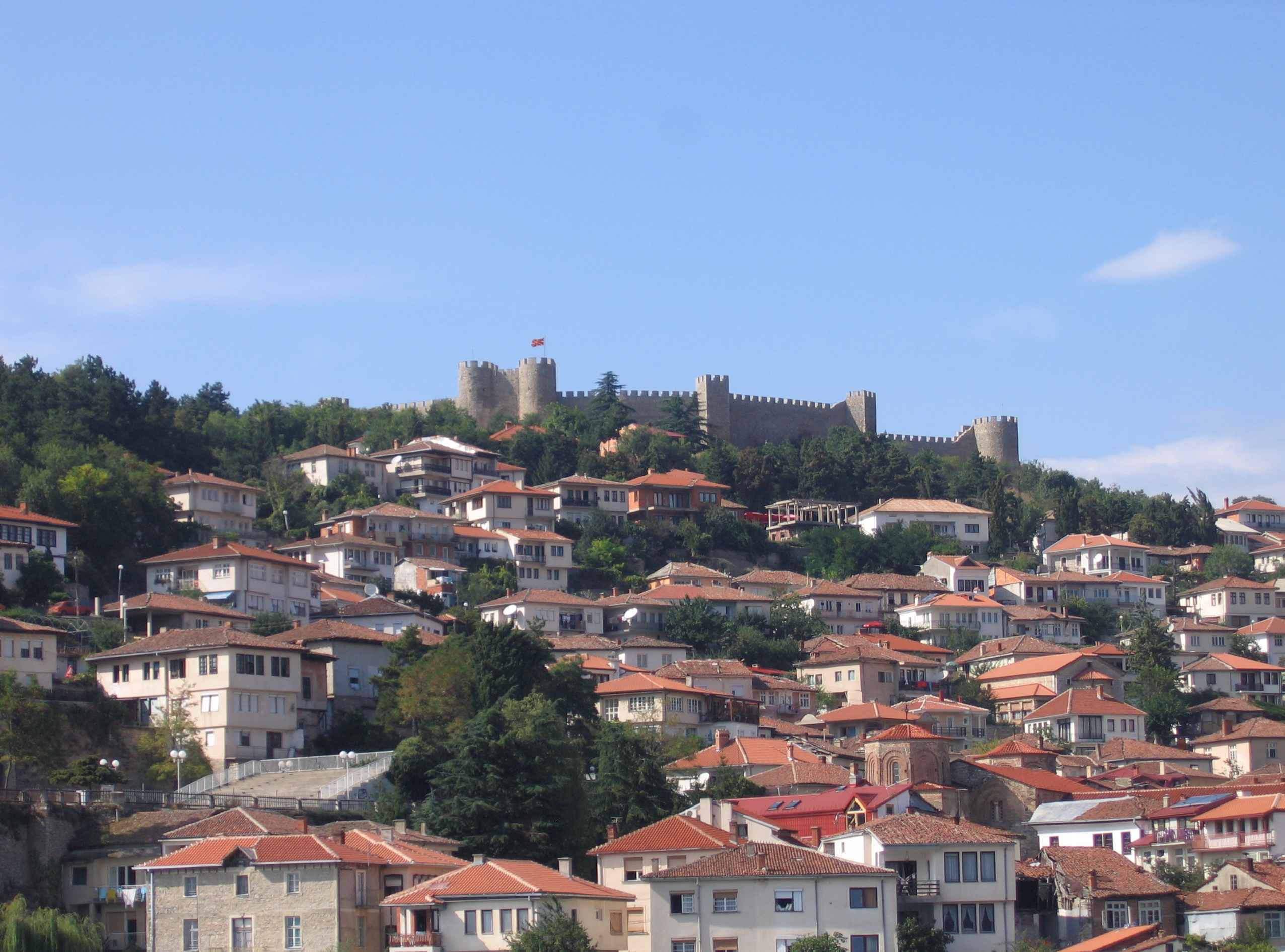 Охрид_2005_2988